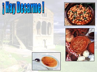 eldesarme